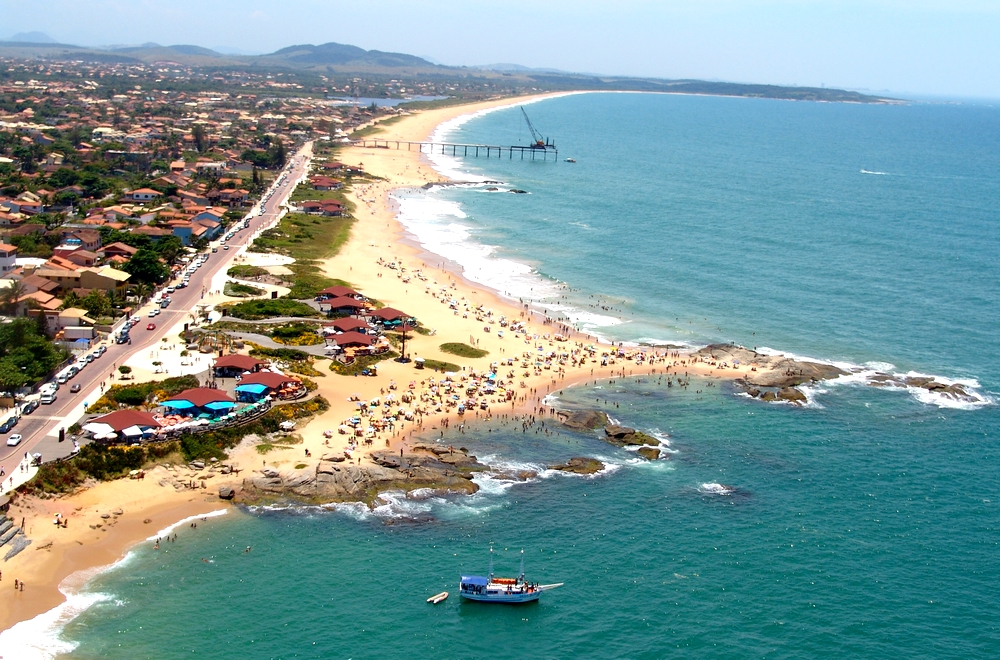 Foto aérea do município de Rio das Ostras